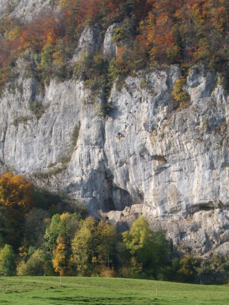 Grottenburg Balm (Gemeinde Balm bei Günsberg) im Kanton Solothurn, Schweiz.